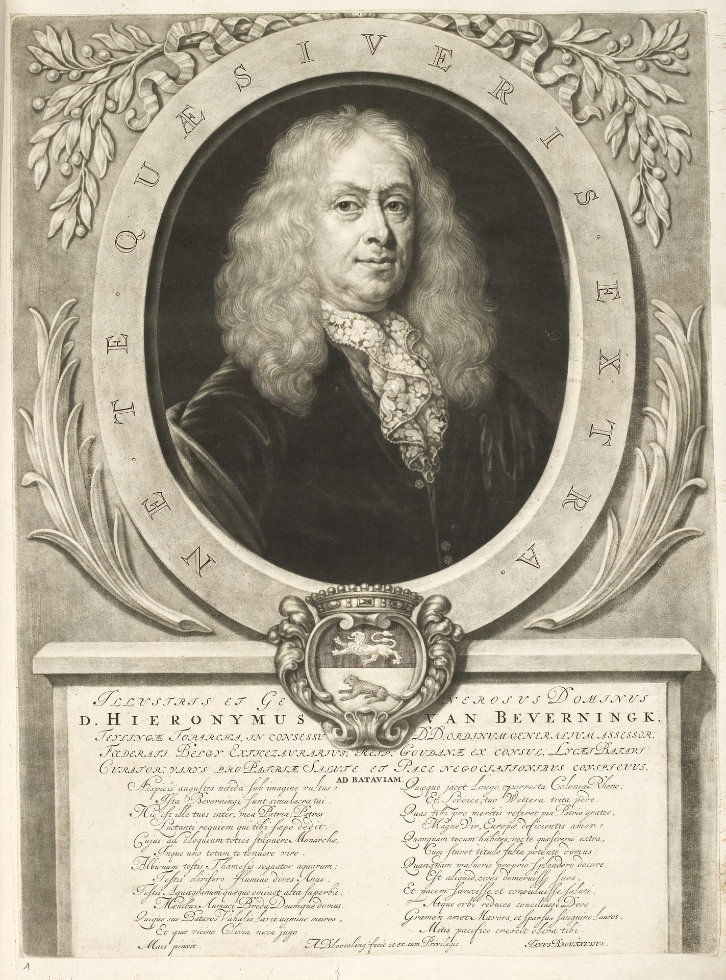 Grafik aus dem Klebeband Nr. 1 der Fürstlich Waldeckschen Hofbibliothek Arolsen Motiv: Hiëronymus van Beverningh